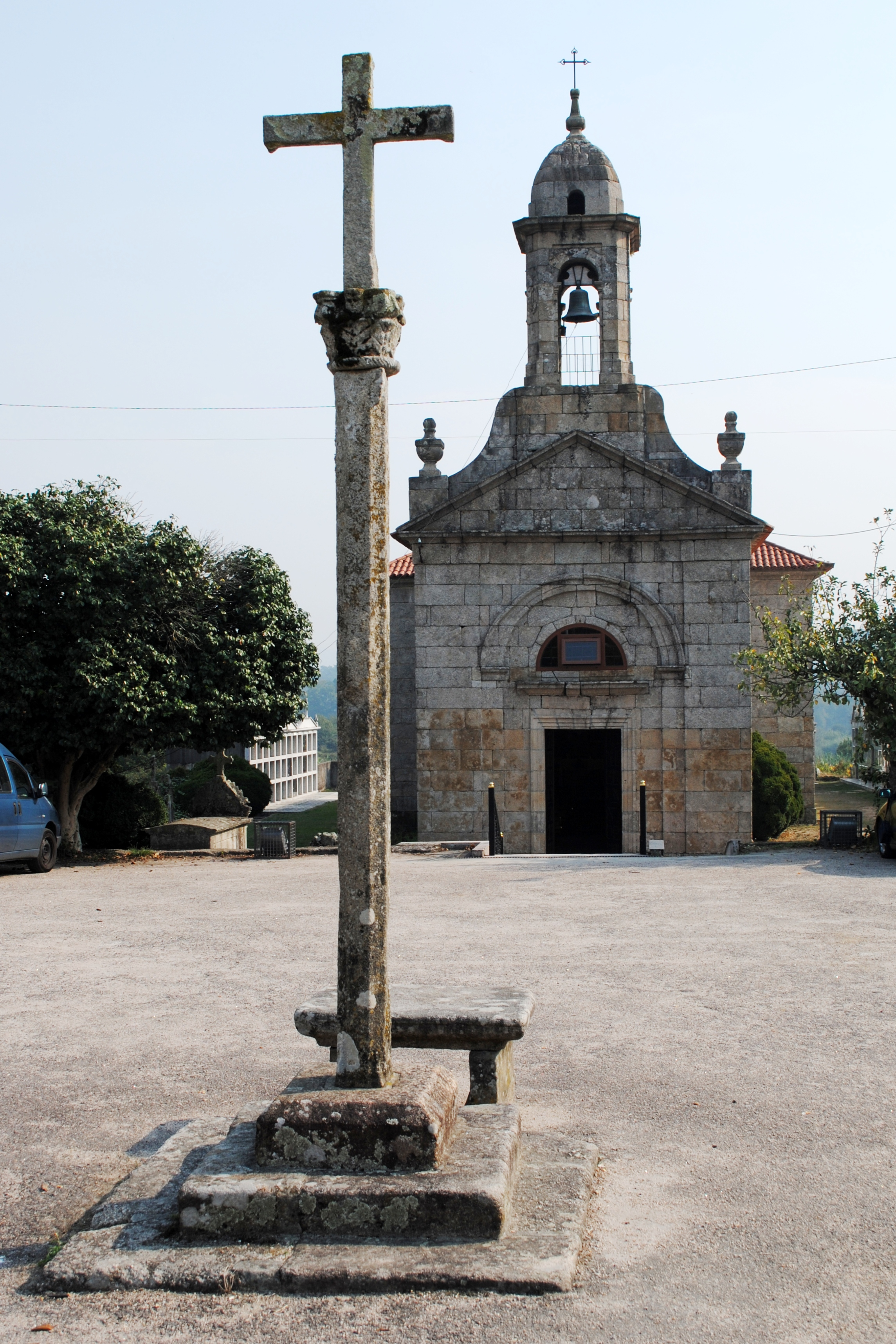 S. Lourenzo de Arnoso, Ponteareas